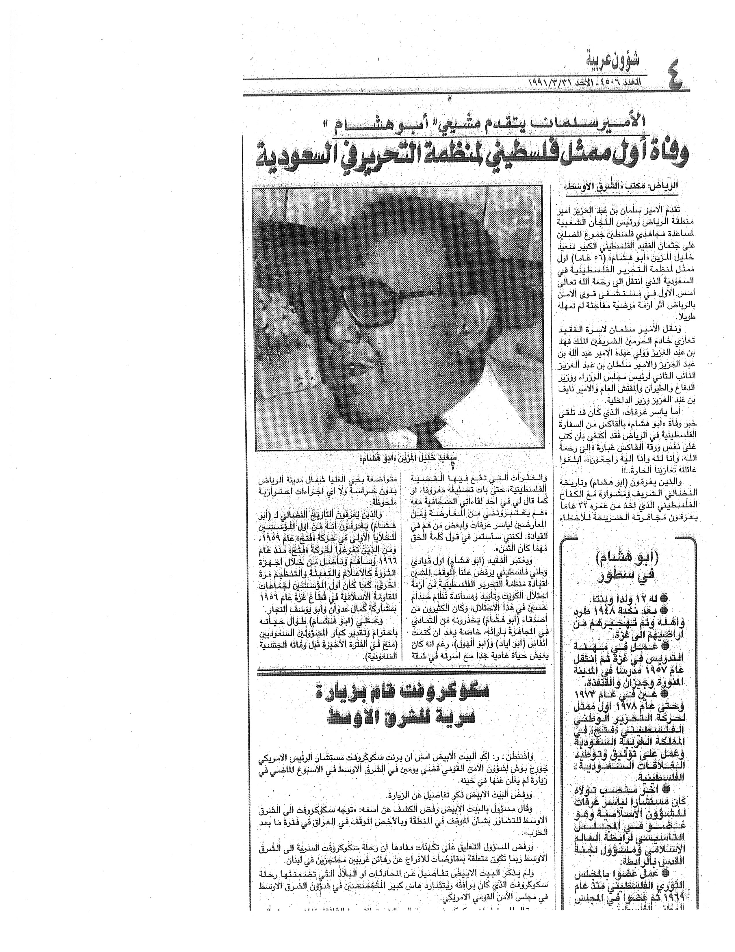 Template:نعي سعيد المزين في جريدة الشرق الاوسط